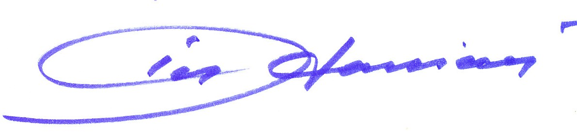 Autogramm Vico Torriano